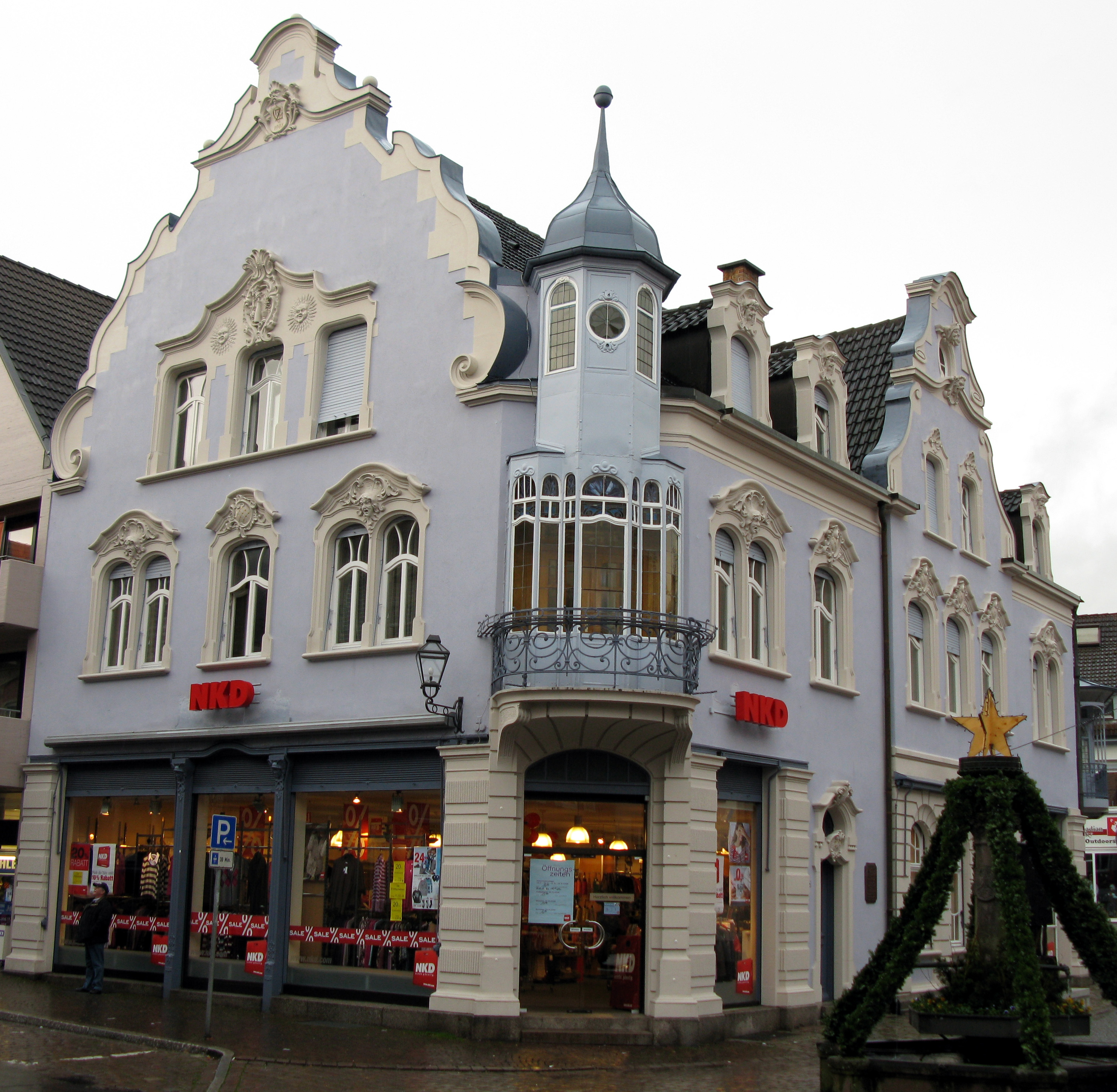 Jugendstil in Zell